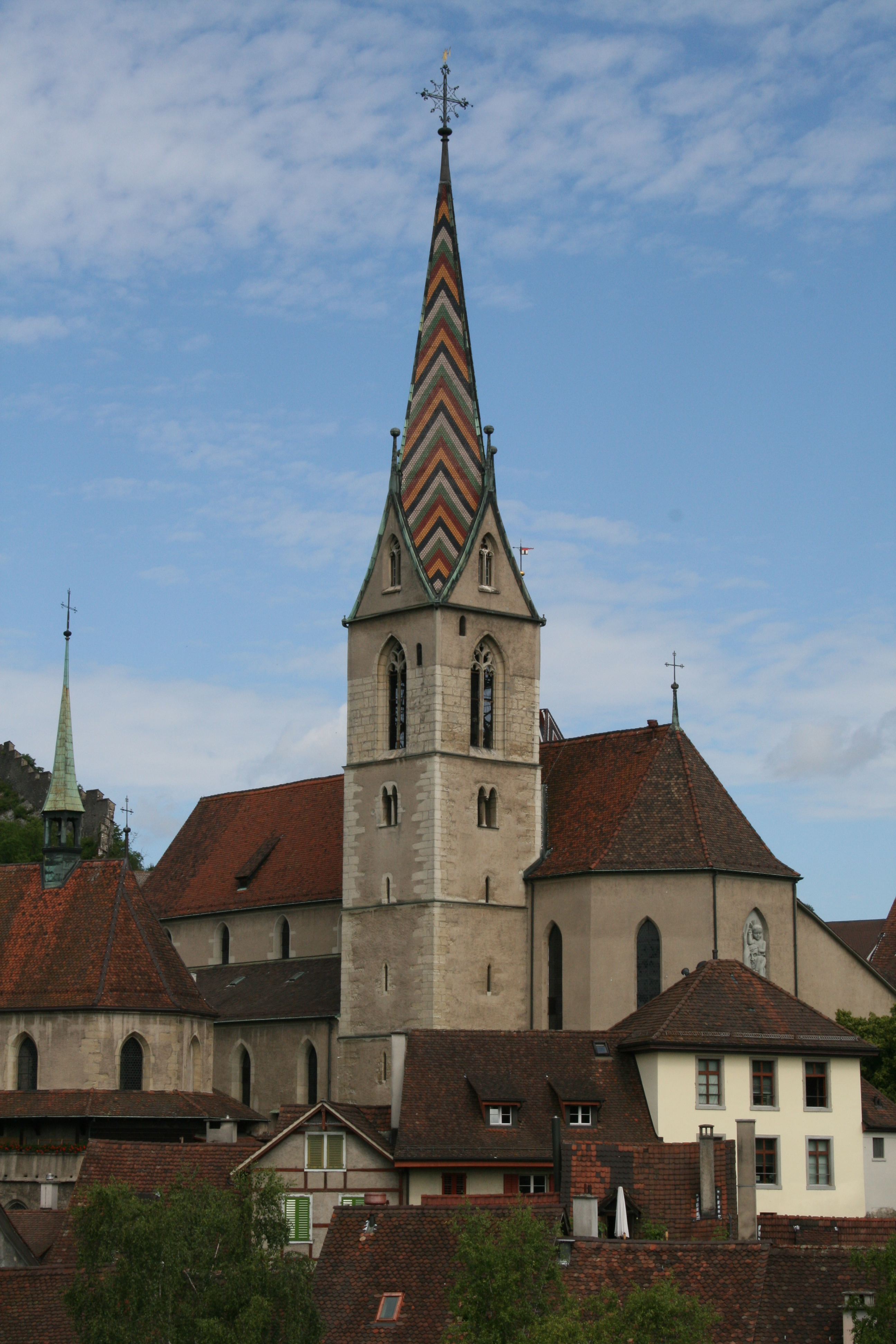 Stadtpfarrkirche Baden AG, Blick von der Hochbrücke, Schweiz